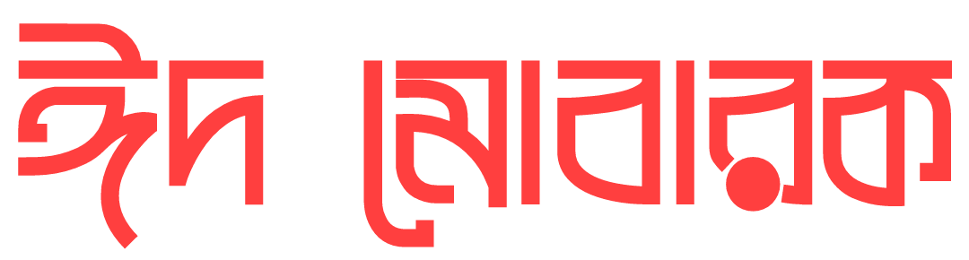 ঈদ মোবারকব্যবহৃত ফন্ট: জান্নাত